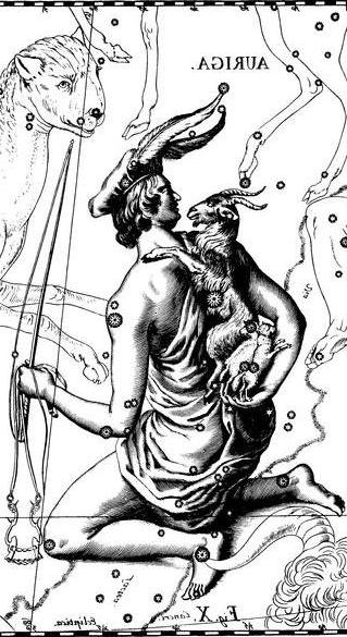 Auriga constellation